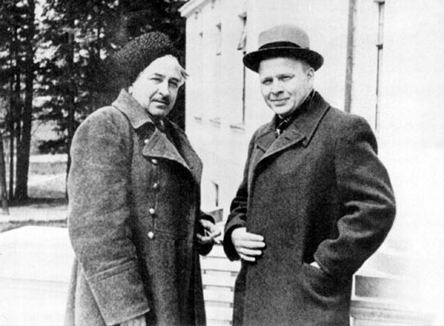 Это фотография датируется началом мая 1941 года. Сделана в доме творчества кинематографистов Болшево. На фотографии писатель Аркадий Гайдар и кинематографист Лев Кулешов. Вероятнее всего это снимок шутка - Гайдар и Кулешов обменялись верхней одеждой.